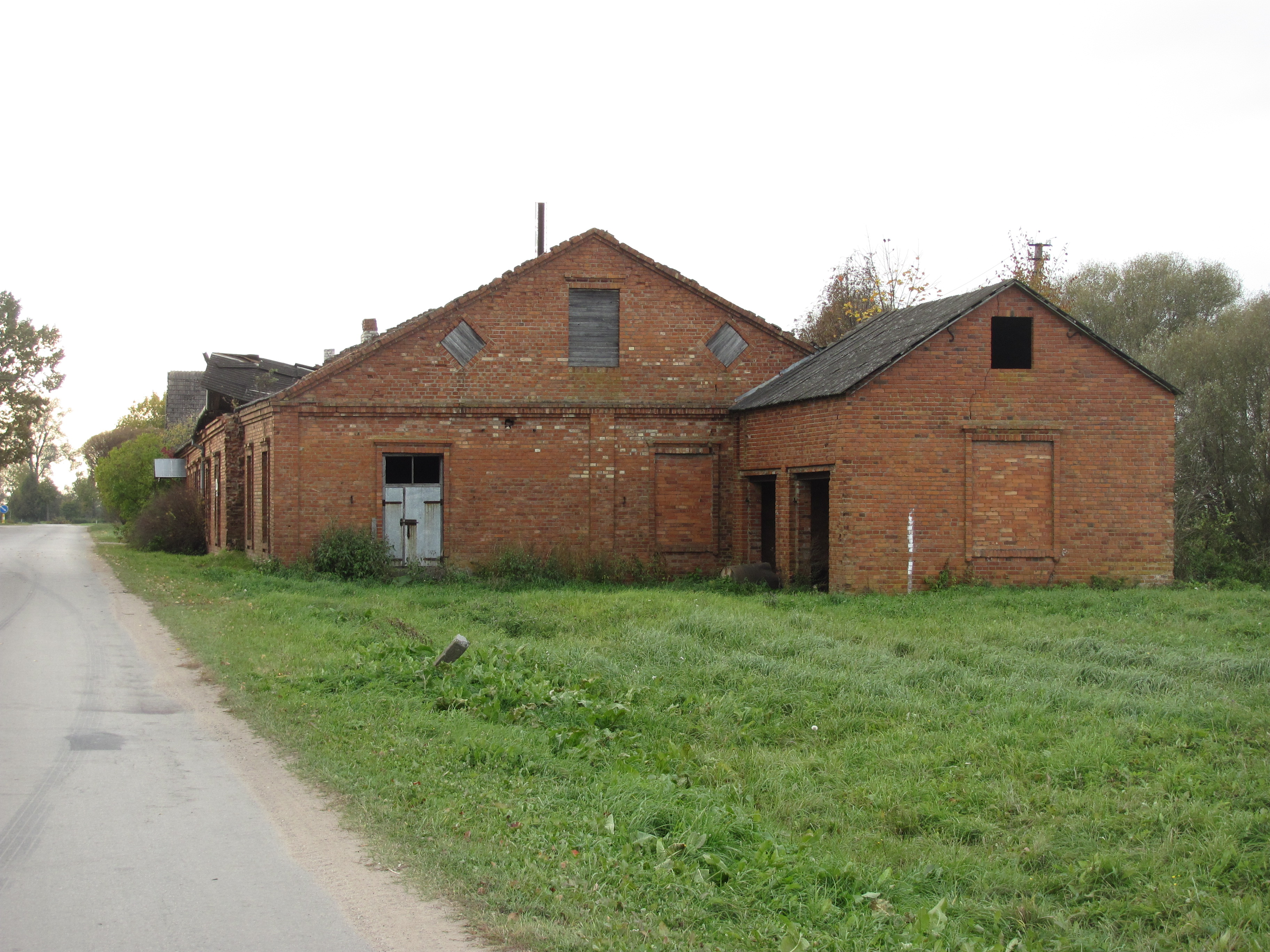 Panemunėlis, Lithuania